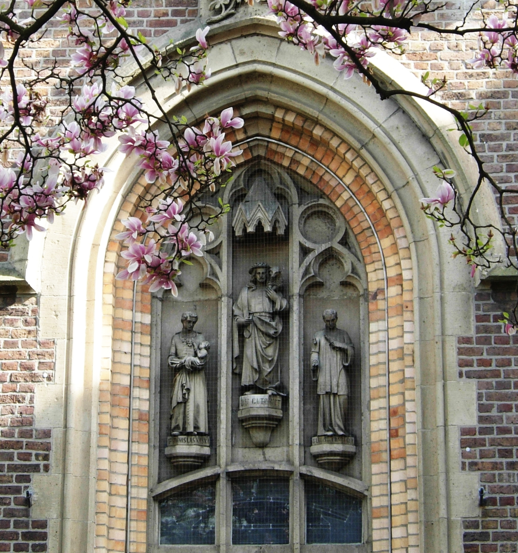 Skulpturen über dem Portal der Klosterkirche St. Joseph des Redemptoristenordens (erbaut von Heinrich Wiethase) auf der Josefshöhe in Bonn-Auerberg: In der Mitte Christus als guter Hirte, links (vom Betrachter) Stanislaus Kostka und rechts Aloisius von Gonzaga. Die beiden Jesuiten waren jung gestorben, wurden heiliggesprochen und gelten bei katholischen Gläubigen als Vorbild für die Jugend. Ihr Andenken an diesem Ort hängt vermutlich zusammen mit der ehemaligen Unterrichts- und Erziehungsanstalt St. Joseph an der Höhe [1], die der Orden 1920 gekauft hat und als Collegium Josephinum weiterführt. ↑ manchmal auch auf der Höhe oder diplomatisch a. d. Höhe